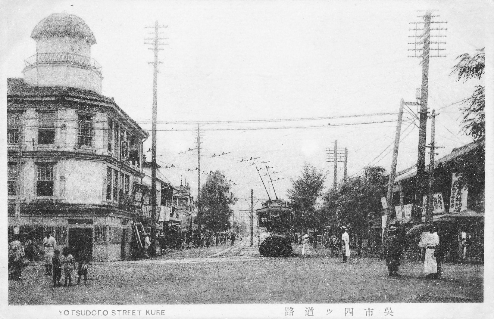 呉電気鉄道が、右側通行を行っていた当時。